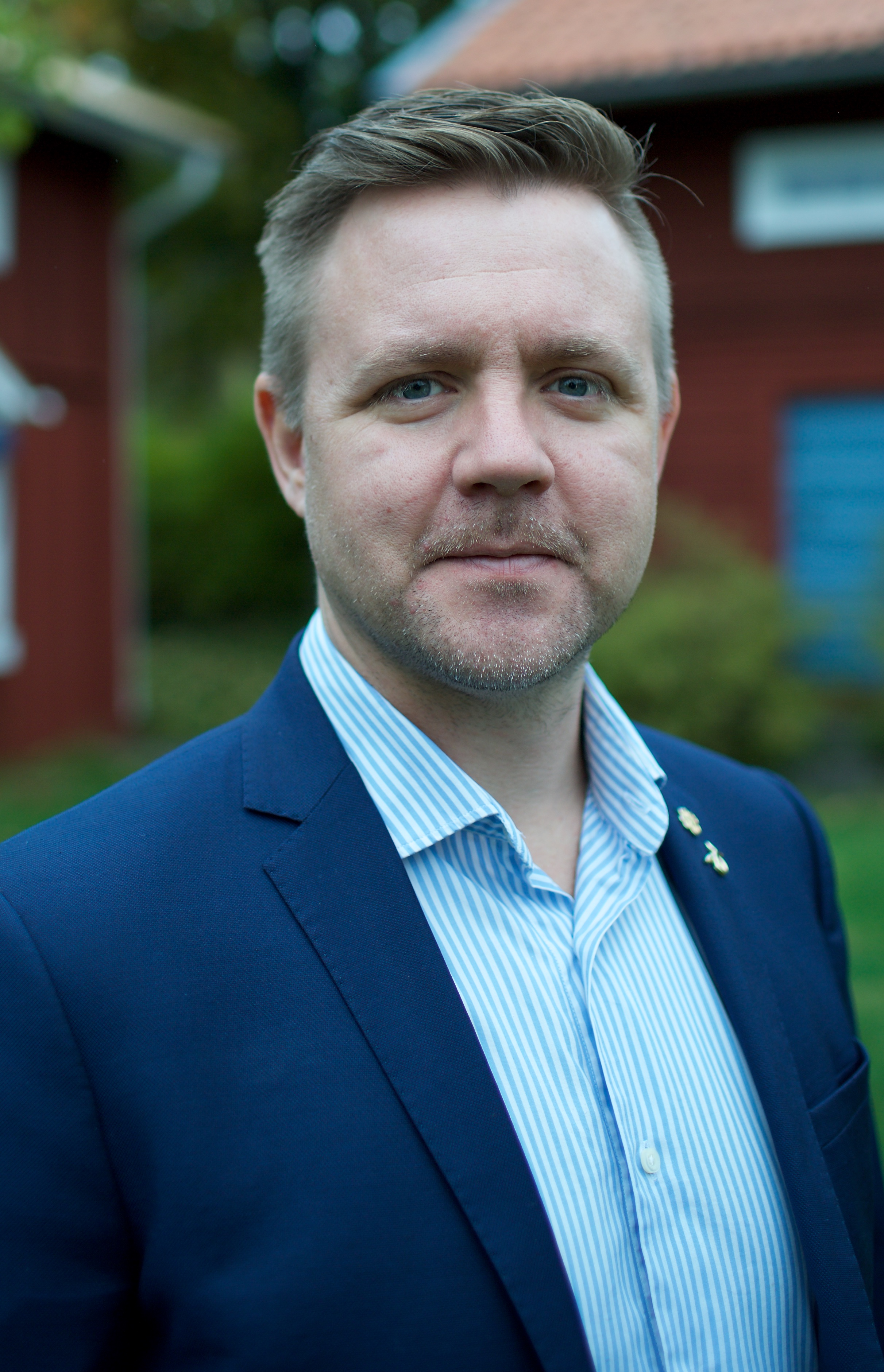 Fredrick Federley Centerpartiet EU-parlamentariker Hemma i Björbo